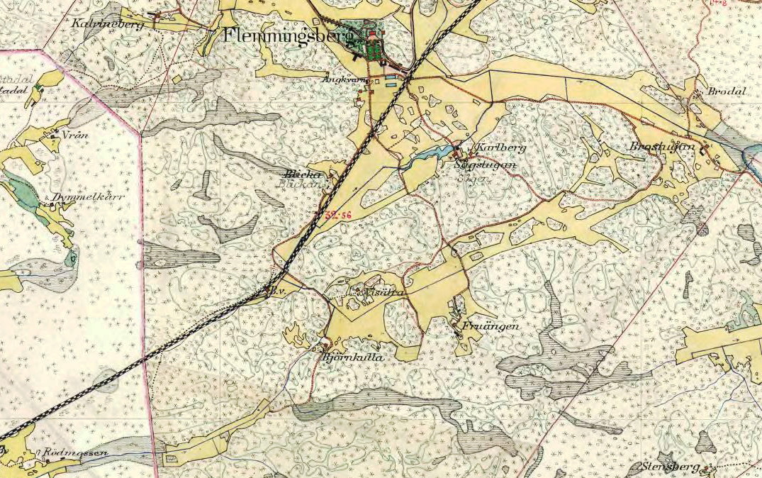 Flemingsbergs gård, Visättra, Björnkulla m.fl. på Häradsekonomiska kartan